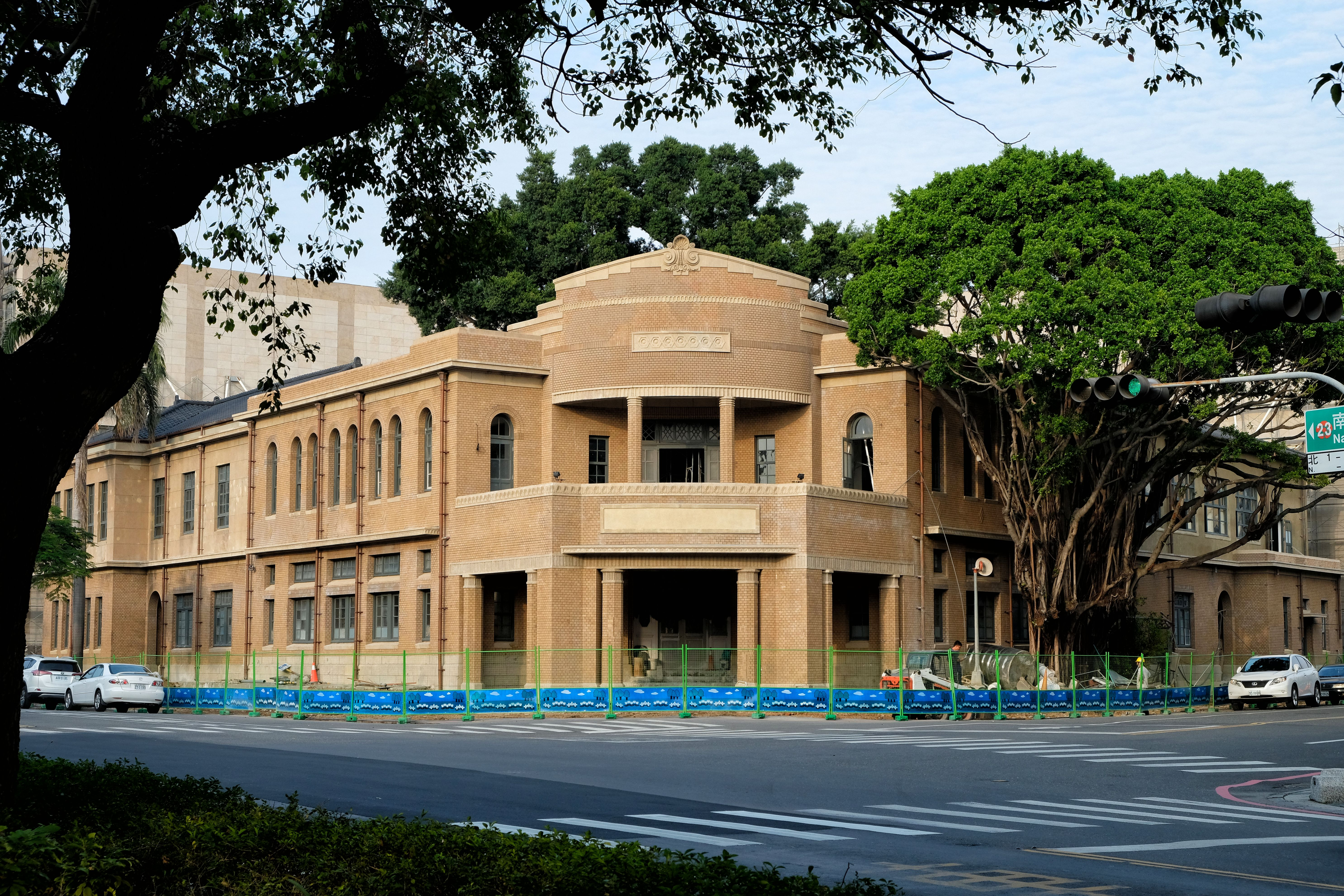 整修即將完成的原臺南警察署